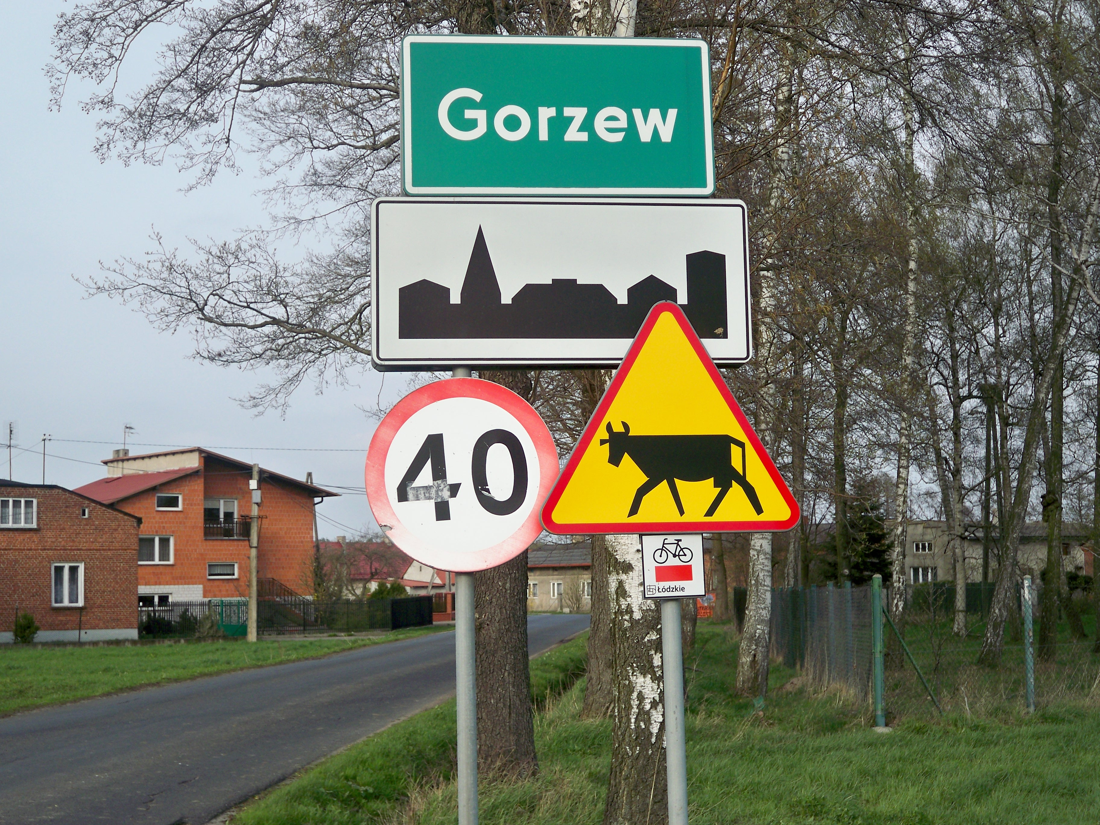 Wjazd od strony Górki Pabianickiej Województwo Łódzkie